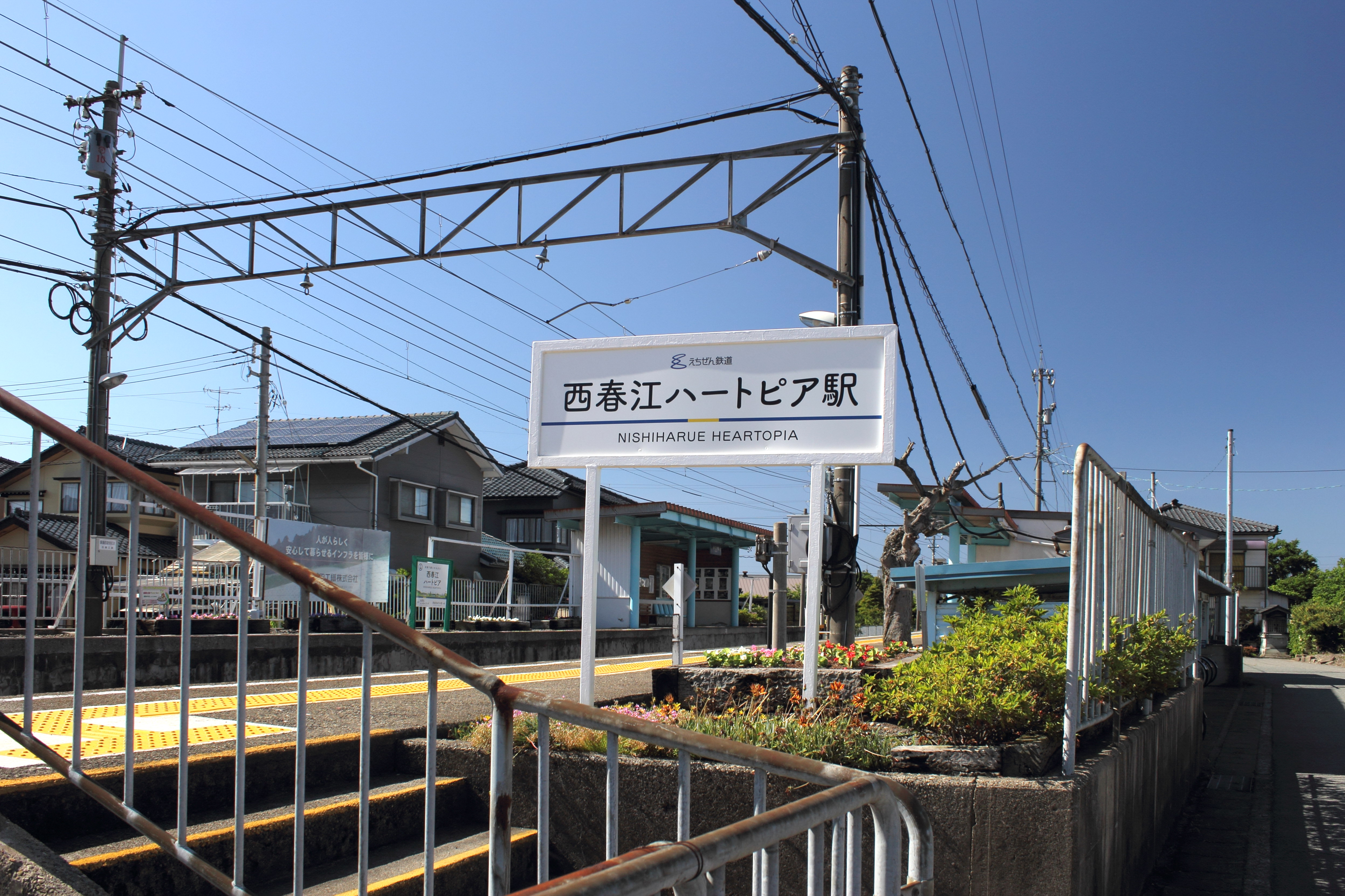 えちぜん鉄道 西春江ハートピア駅 駅名表示板